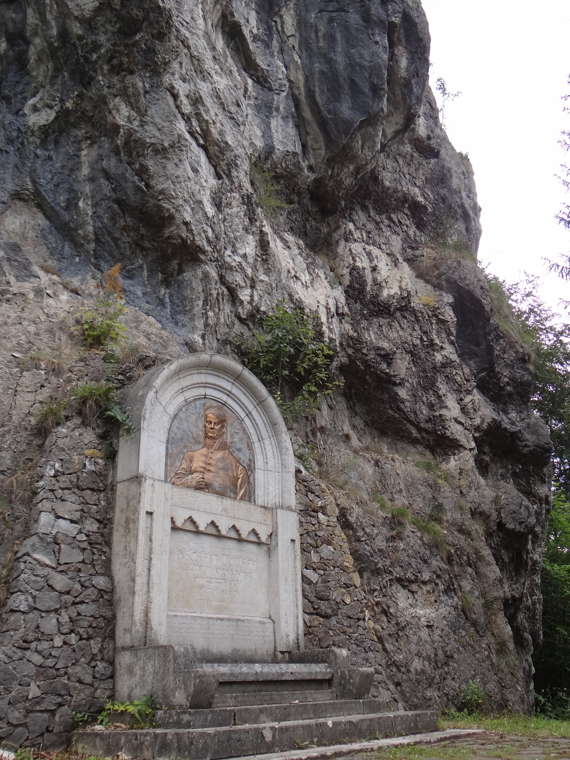 Dolný Jelenec